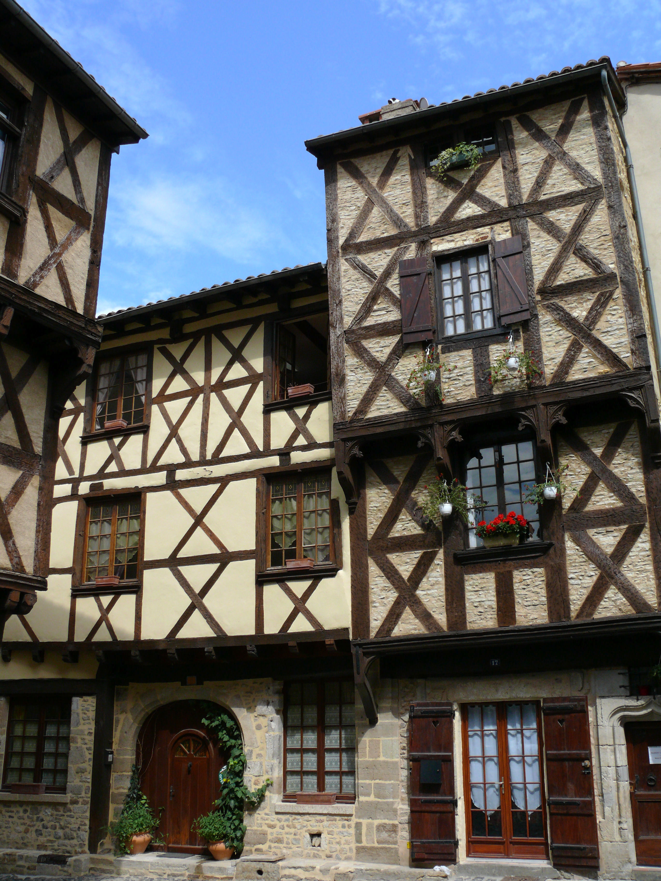 Billom - 15-17 rue des Boucheries au chevet de la collégiale Saint-Cerneuf